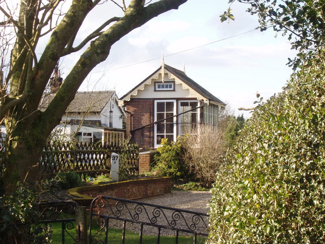 Signal Box